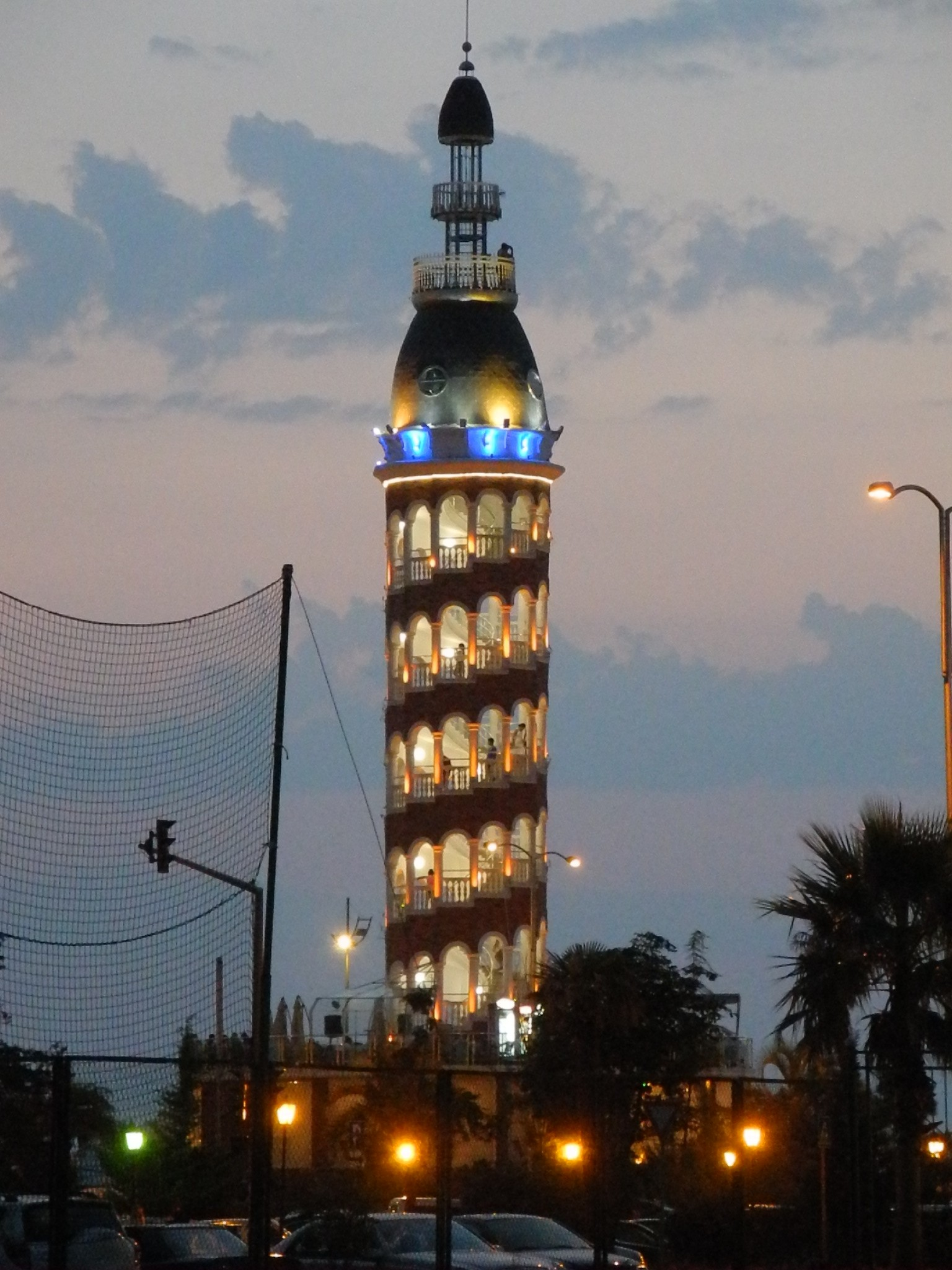 Batumi - Pisaturm bei Nacht